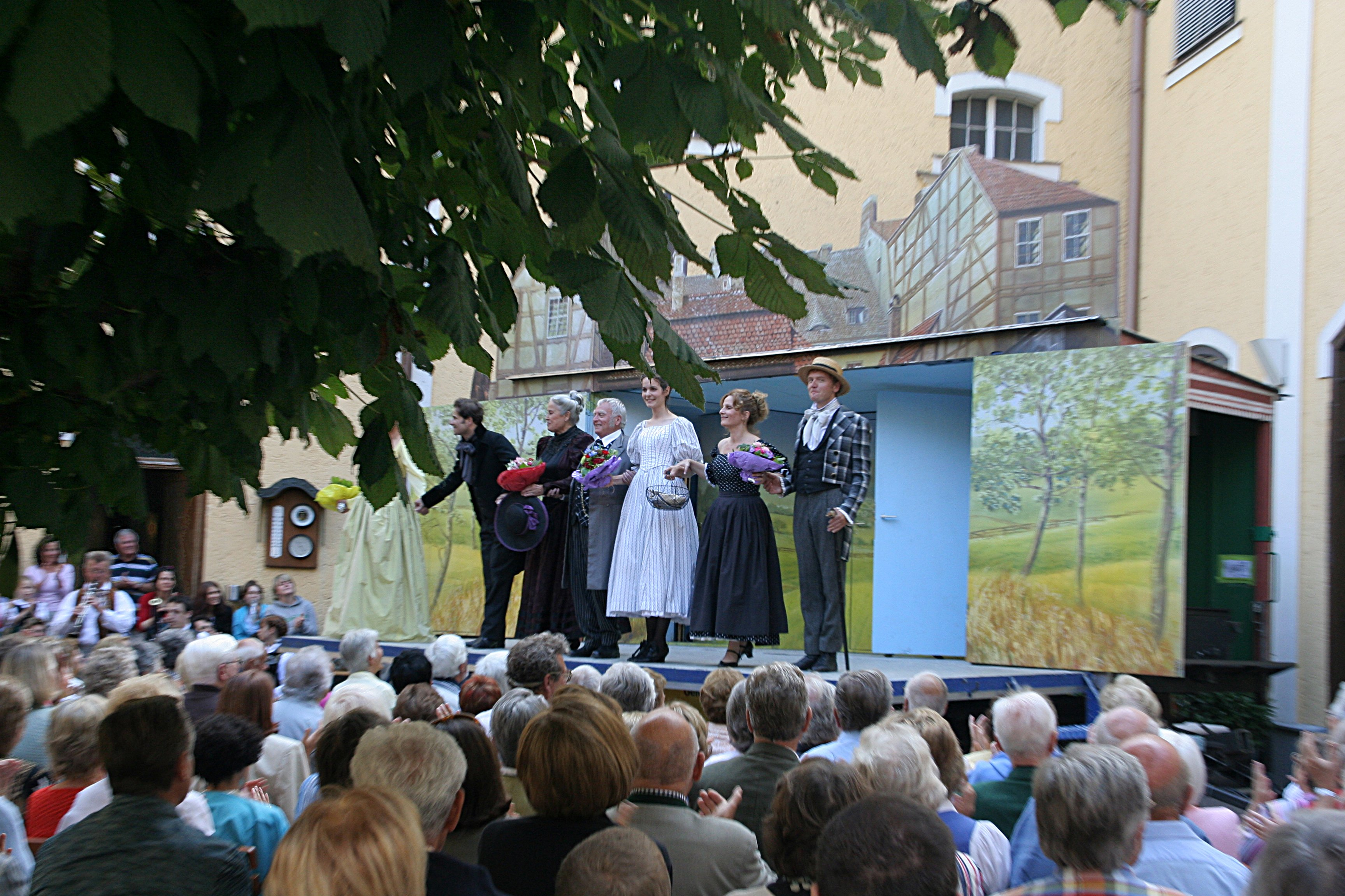 Salzburger Straßentheater 2005 "Das Mädel aus der Vorstadt"